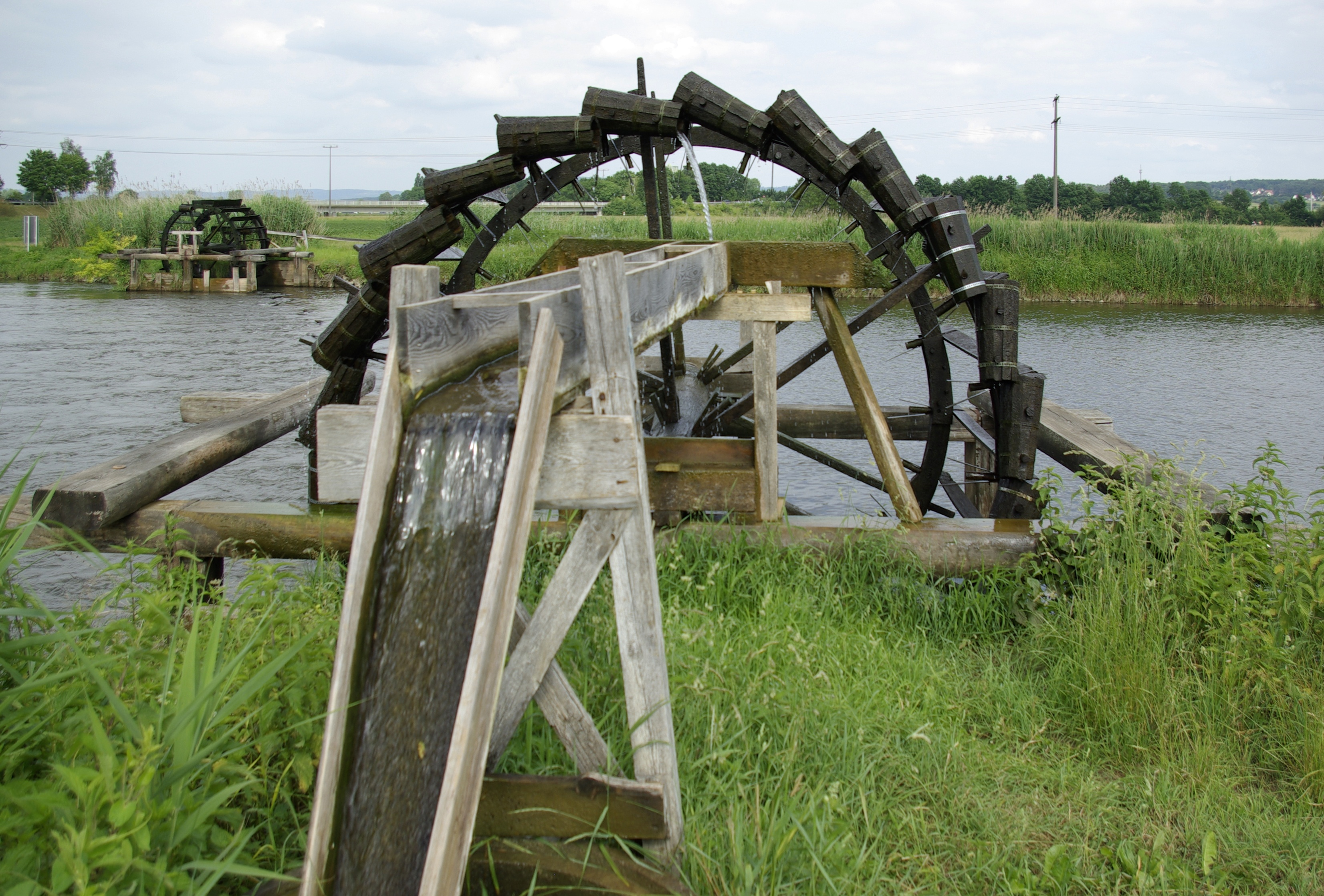 Schöpfrad Rinnigrad an der Regnitz in Möhrendorf, im Hintergrund das Schmiedsrad.